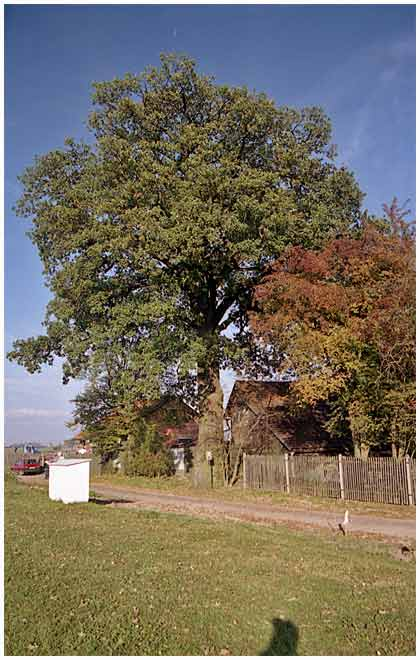 památný dub v obci Střezetice